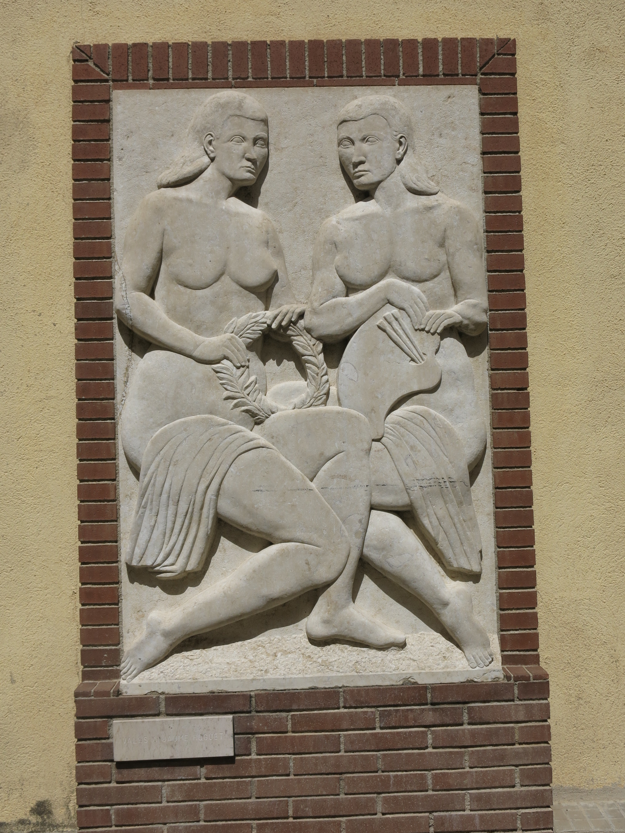 Valls a Jaume Huguet, de Josep Busquets Òdena, al Pius Hospital de Valls